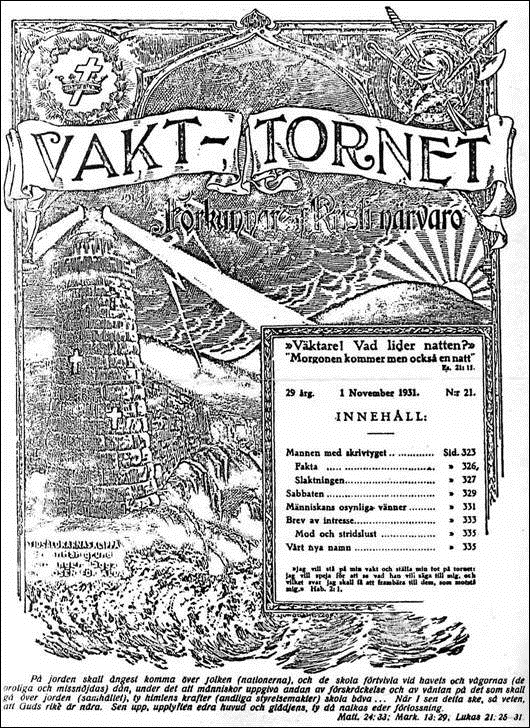 Strażnica w języku szwedzkim (1 listopada 1931)